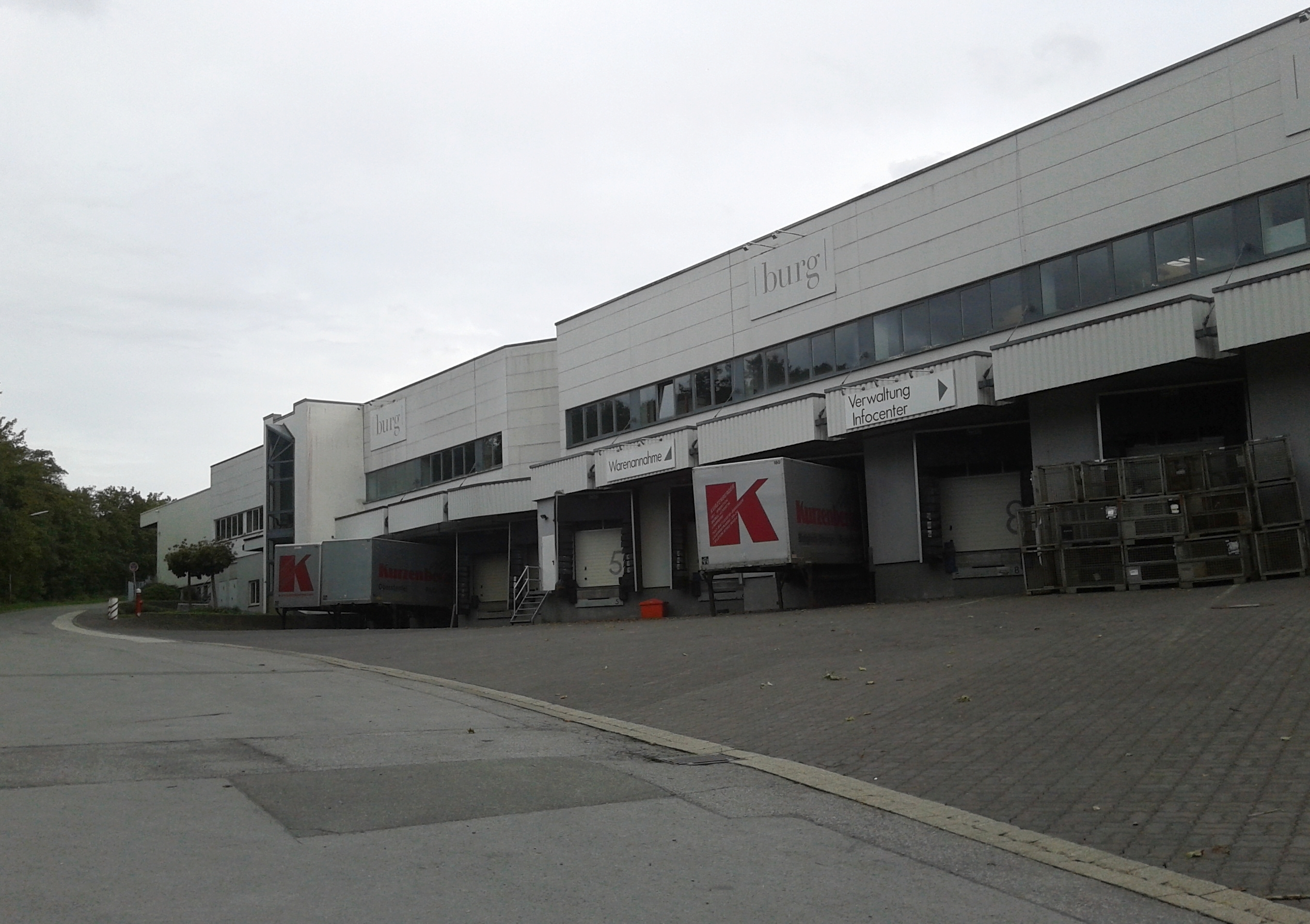 Fa. Burgbad in Schmallenberg-Bad Fredeburg (Germany)